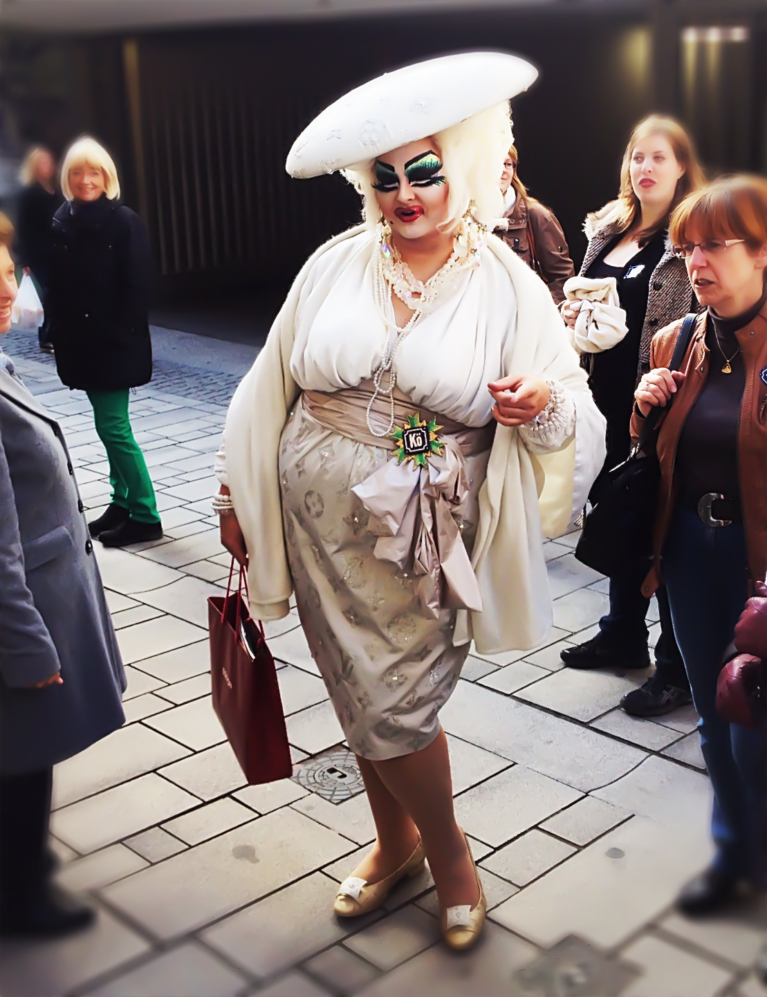 Freifrau von Kö ist der Name der Kunstfigur des Düsseldorfer Travestie-Künstlers und Stadtführers Andreas Patermann.